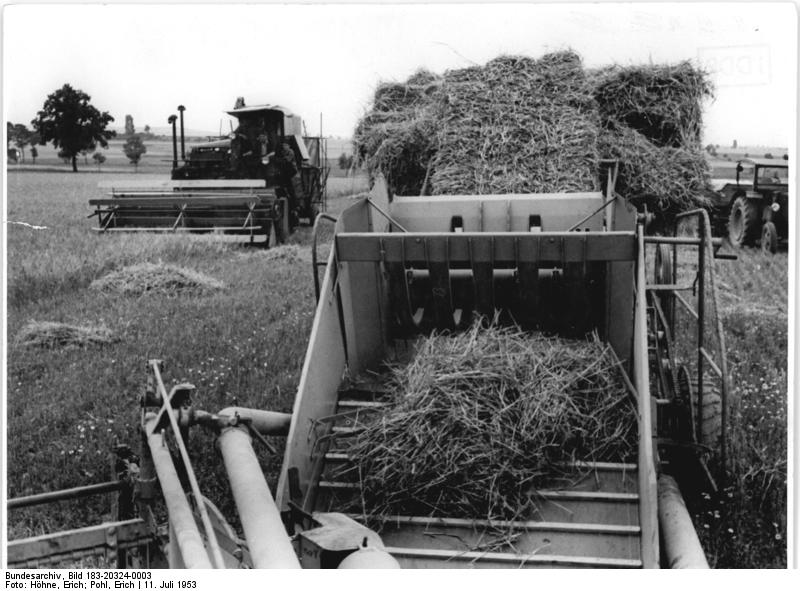 Großenhain, Ernte, Strohpresse Zentralbild Höhne-Pohl 11.7.1953 Mechanisierte Ernteeinbringung in der Deutschen Demokratischen Republik Die MTS Radeburg arbeitet mit dem "Stalinez 4" auf den Feldern des Volksgutes Kalkreuth bei Großenhain. Um die anfallende Spreu für Futterzwecke verwenden zu können, wird diese jetzt durch einen kleinen Umbau am Strohsammelwagen des "Stalinez 4" vom Stroh getrennt und von Zeit zu Zeit abgesetzt. Mittels Saugvorrichtungen wird die abgesetzte Spreu auf Wagen verladen. Das Stroh wird in Streifen abgesetzt und anschließend von einer kombinierten Sammel- und Strohpresse aufgenommen und ebenfalls verladen. UBz: Der Mähdrescher "Stalinez 4", die Sammel- und Strohpresse und die zum Abtransport des Getreides bestimmten Wagen arbeiten auf einem Feld des Volksgutes Kalkreuth. (Im Vordergrund die Sammel- und Strohpresse).